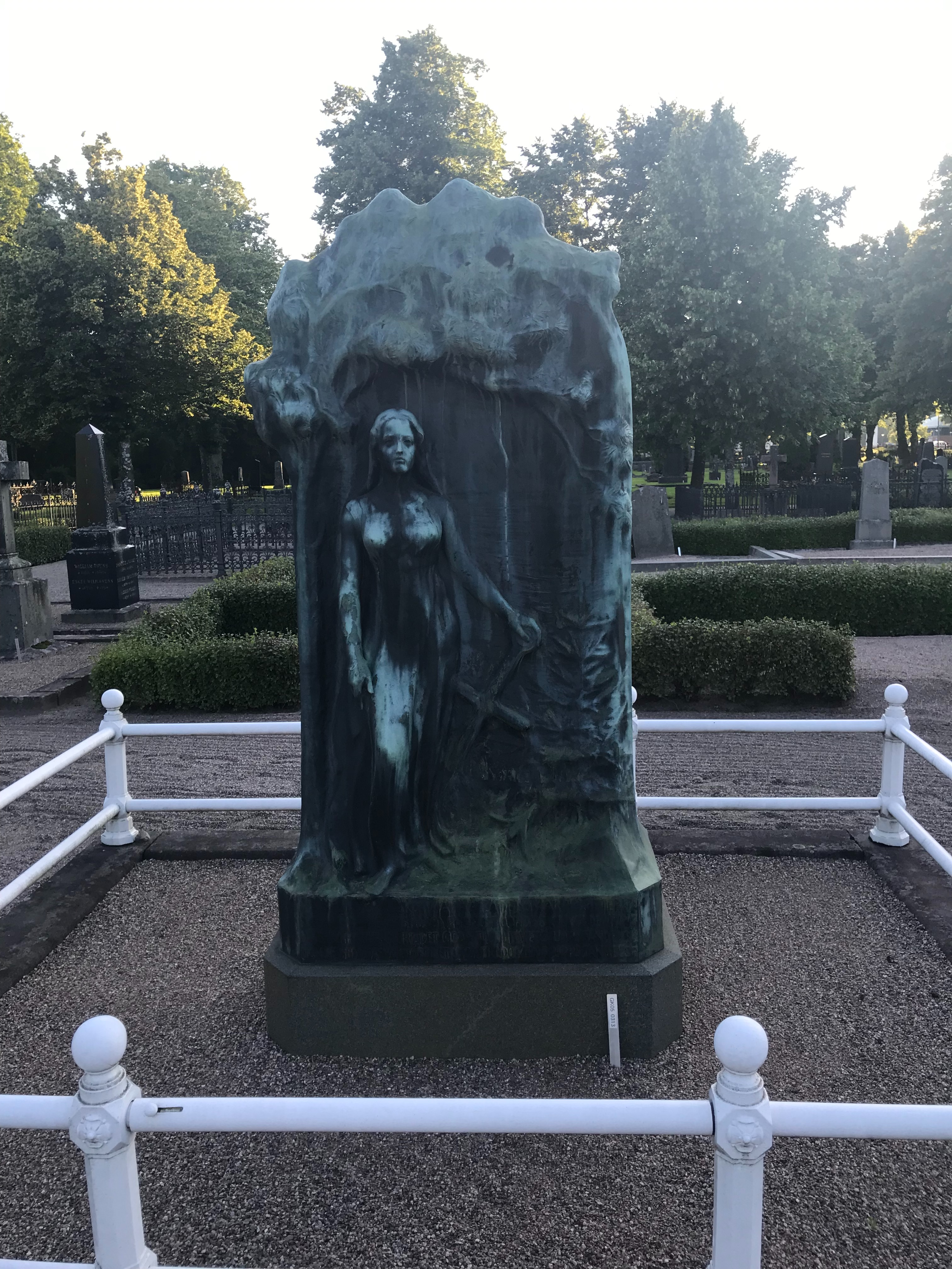 Gävle, Sverige, July 2019